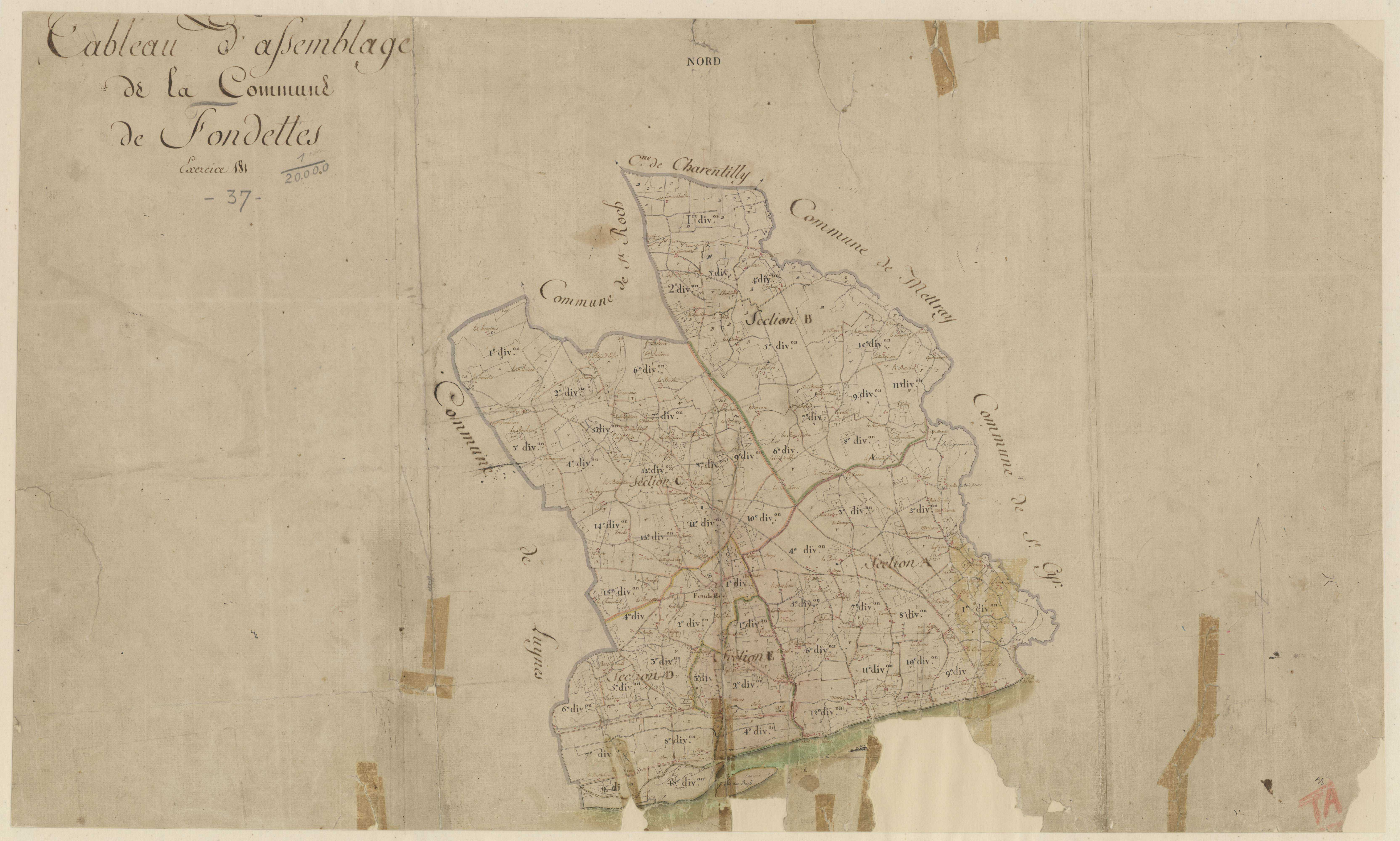 Carte représentant le cadastre napoléonien de Fondettes au 19 ème siècle. Archives départementales d'Indre-et-Loire.